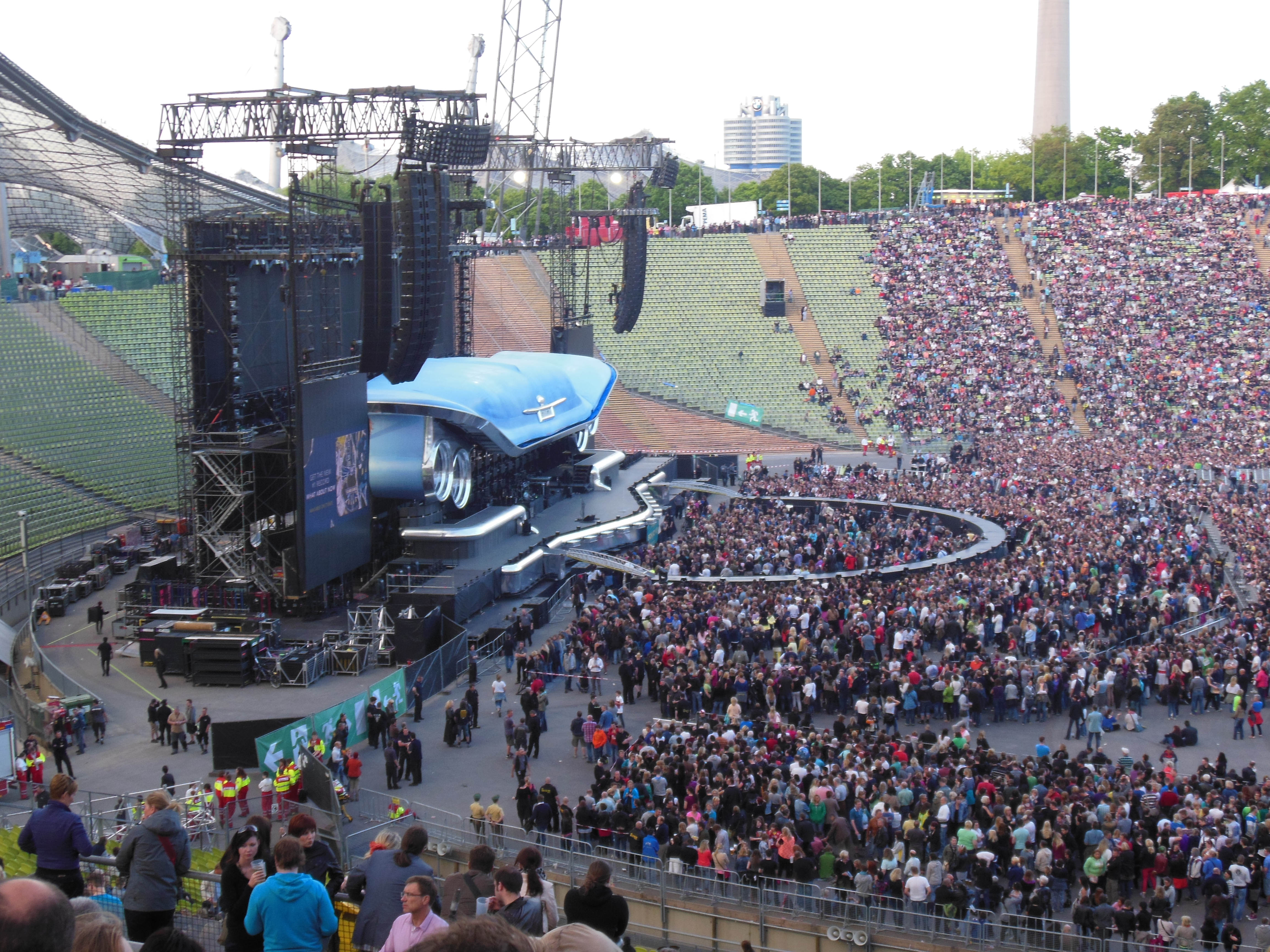 Konzertbühne im Münchener Olympiastadion beim Bon-Jovi-Konzert am 18. Mai 2013